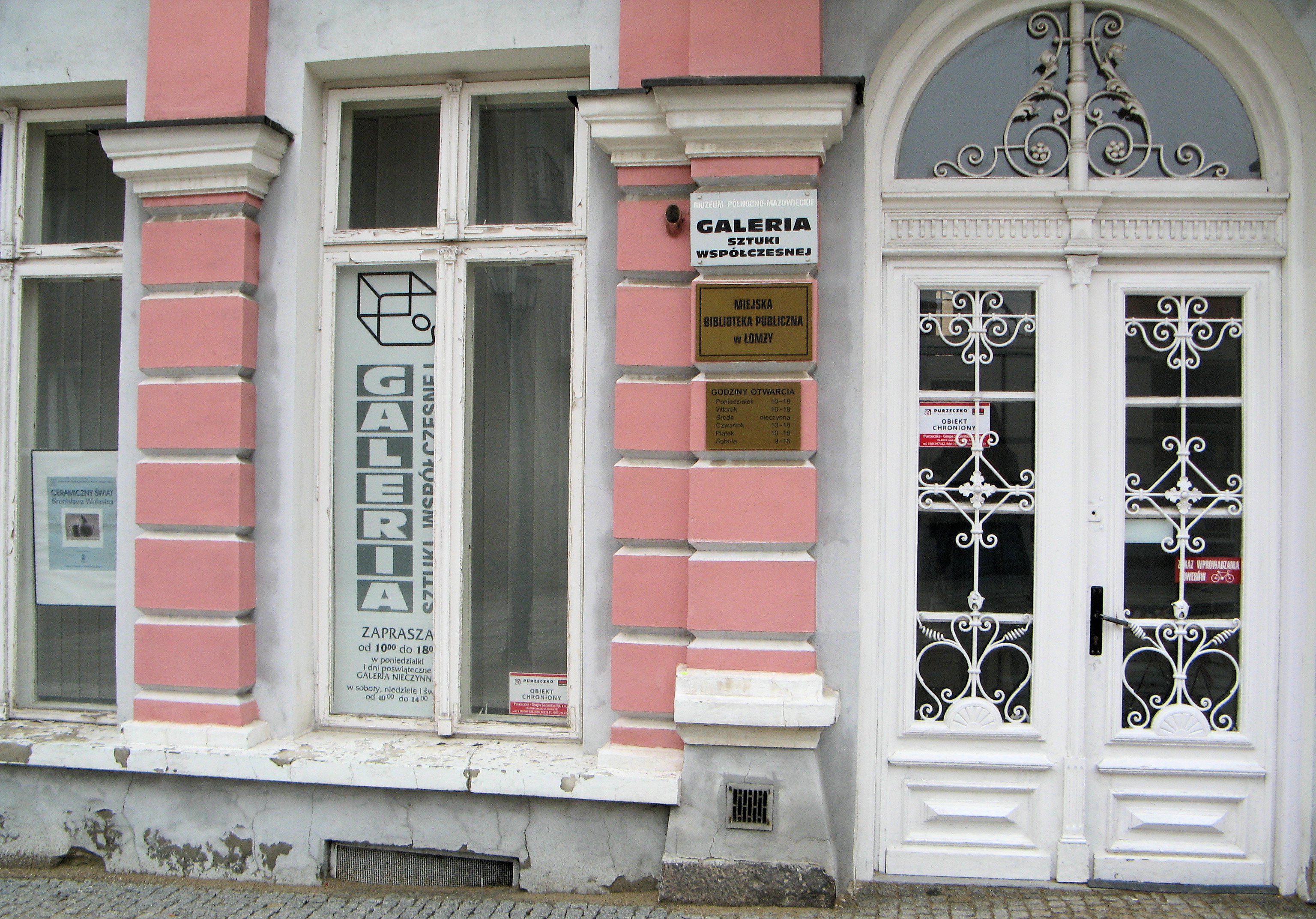 Galeria Sztuki Współczesnej w Łomży